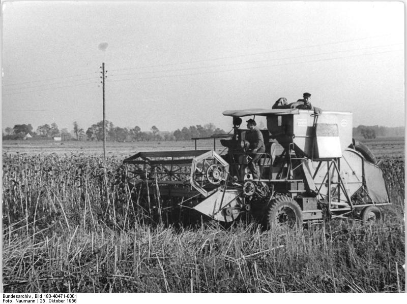 Brodau, Sonnenblumenernte mit Mähdrescher Zentralbild Naumann 25.10.1956 Sonnenblumenernte mit dem Mähdrescher der MTS Döbernitz Reibungslos wurde mit dem Weimarer Mähdrescher S 4 der MTS Döbernitz das 3, 8 ha grosse Sonnenblumenfeld der LPG Brodau, geerntet. UBz: Combine Führer Willy Richter bei der Sonnenblumenernte.